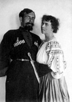 Павло Юхимович і Олександра Михайлівна Дибенки